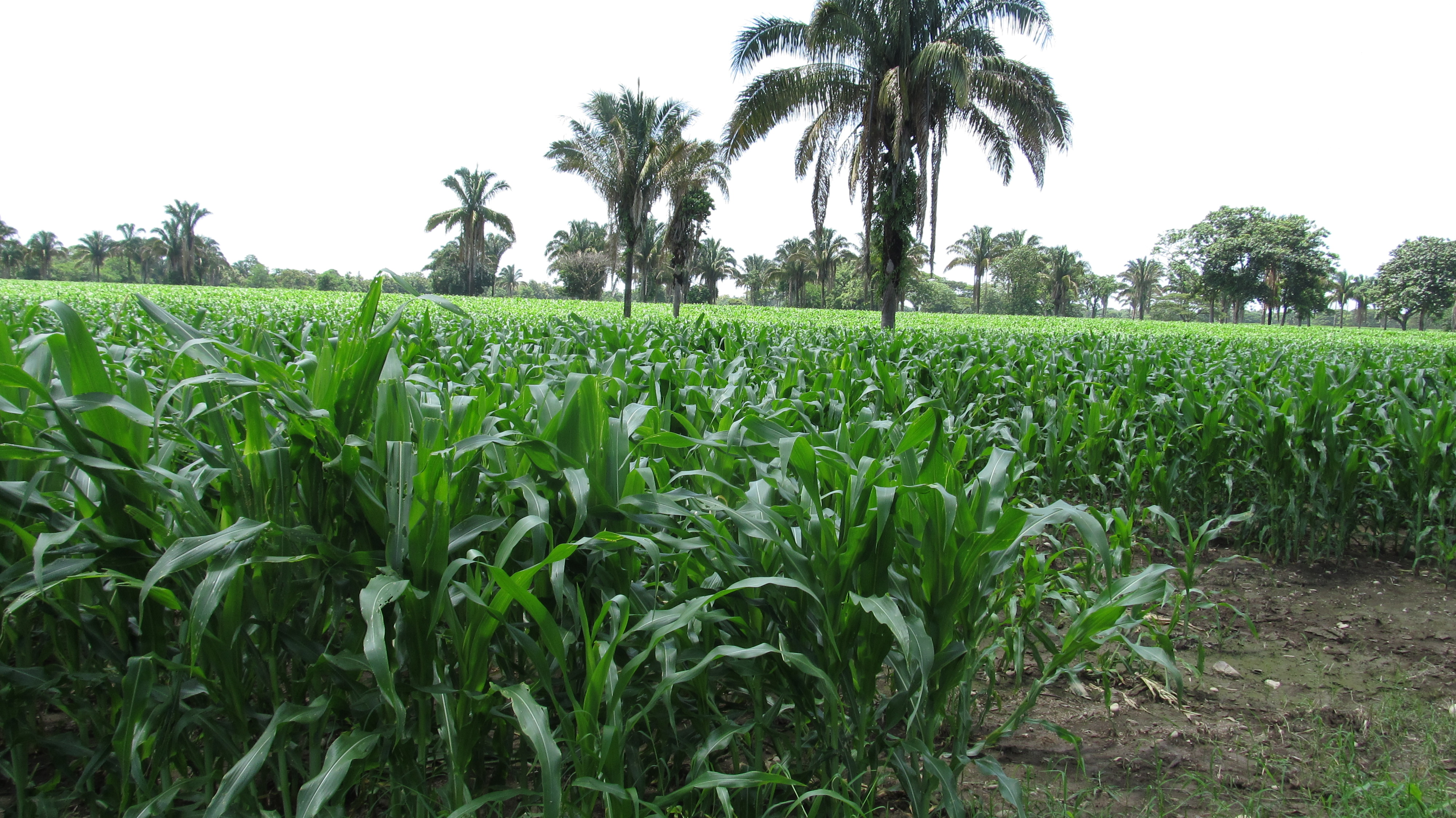 Sembradío de maíz en el sector el 'Uno' de la localidad de Socopó (estado Barinas), Venezuela.